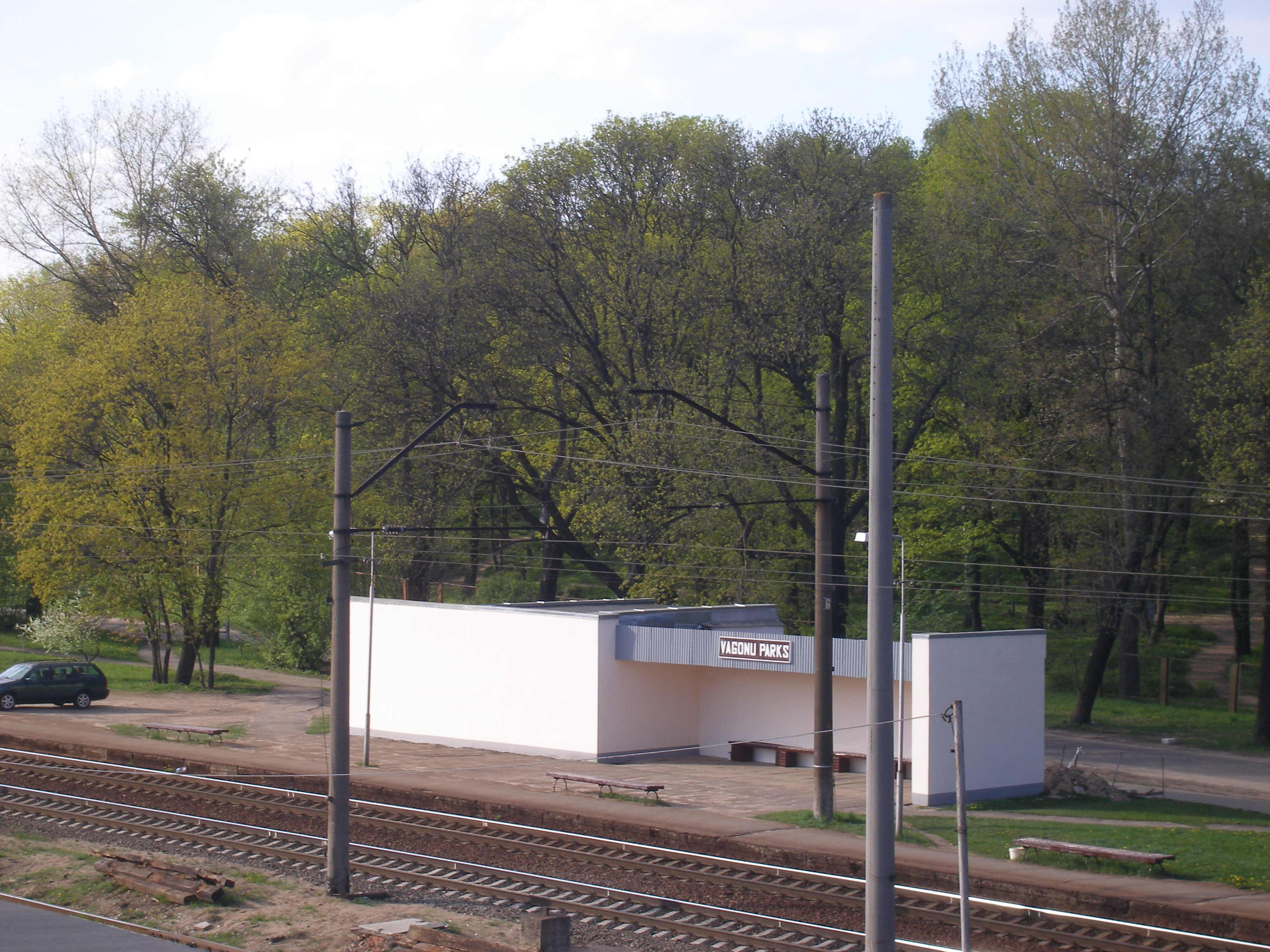 Vagonu parka pieturas ēka Rīgas virzienā. Fotografēts 2010. gada 12. maijā.